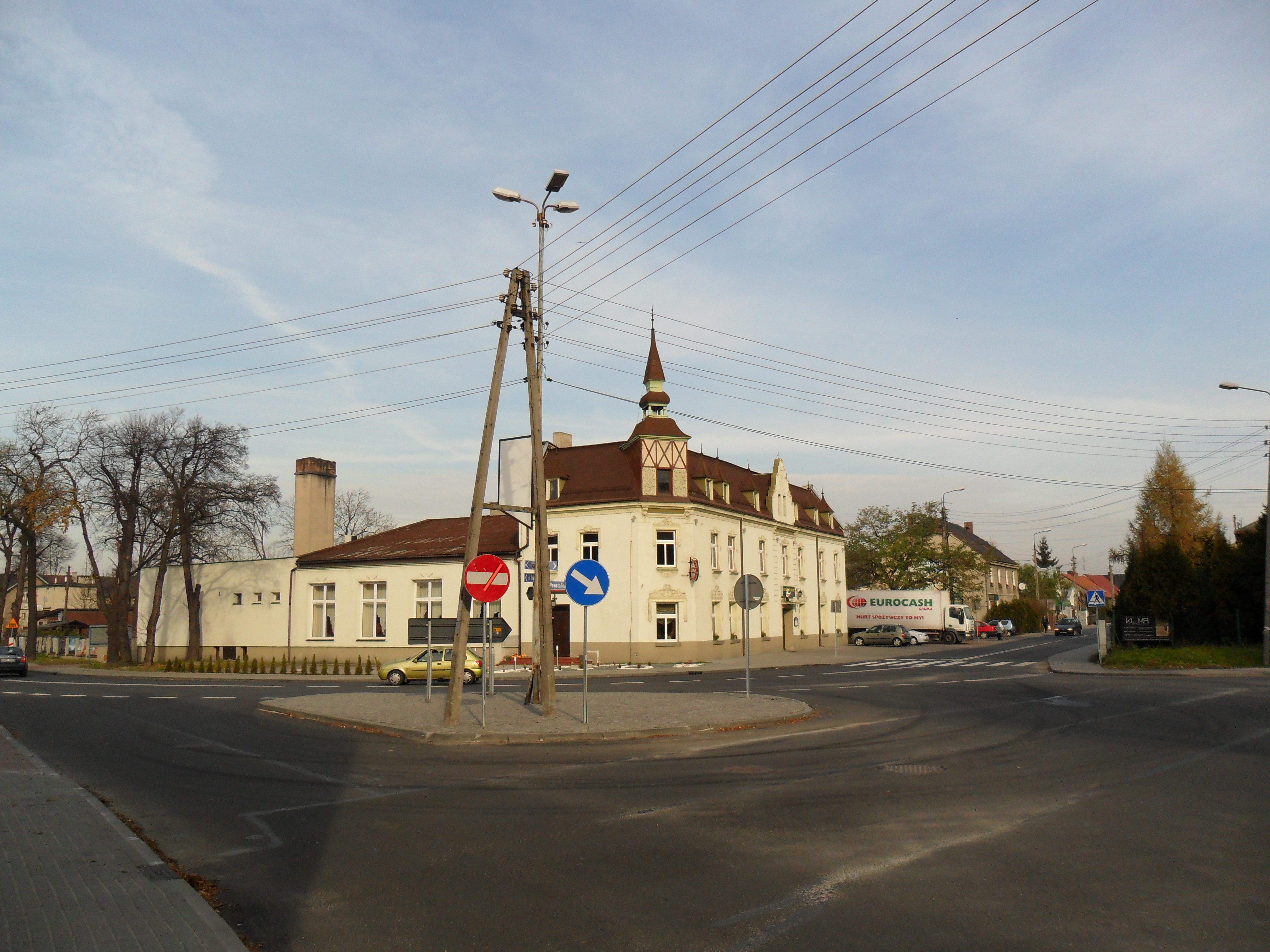 Centrum Markowic (dzielnica Raciborza)